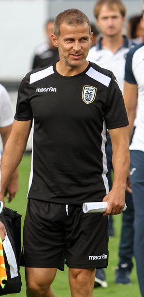 Любиша Ранкович - сербський футбольний тренер